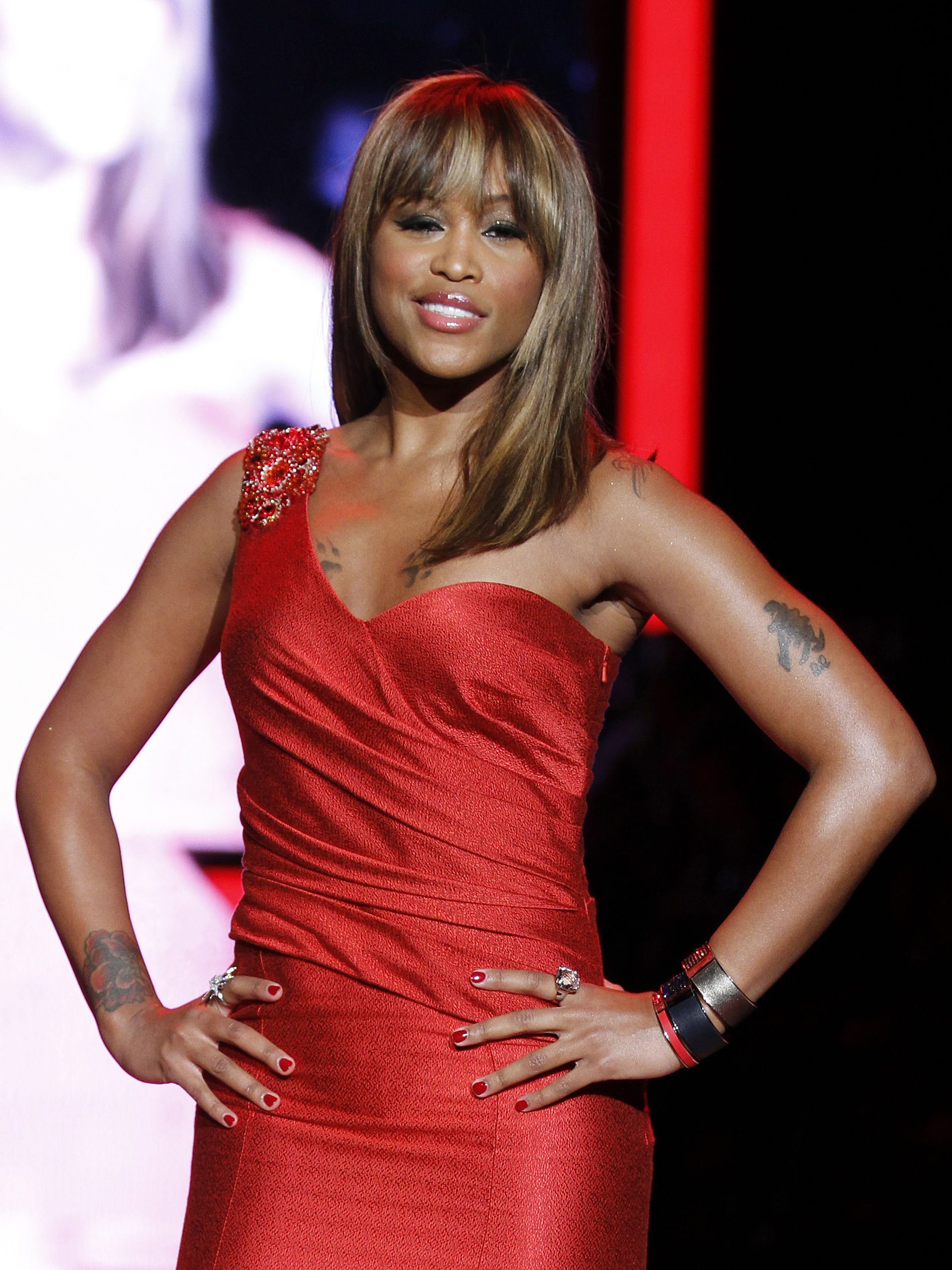 Eve in Oscar de la Renta 2011.